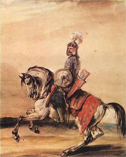 Hetman Stanisław Jan Jabłonowski, obraz